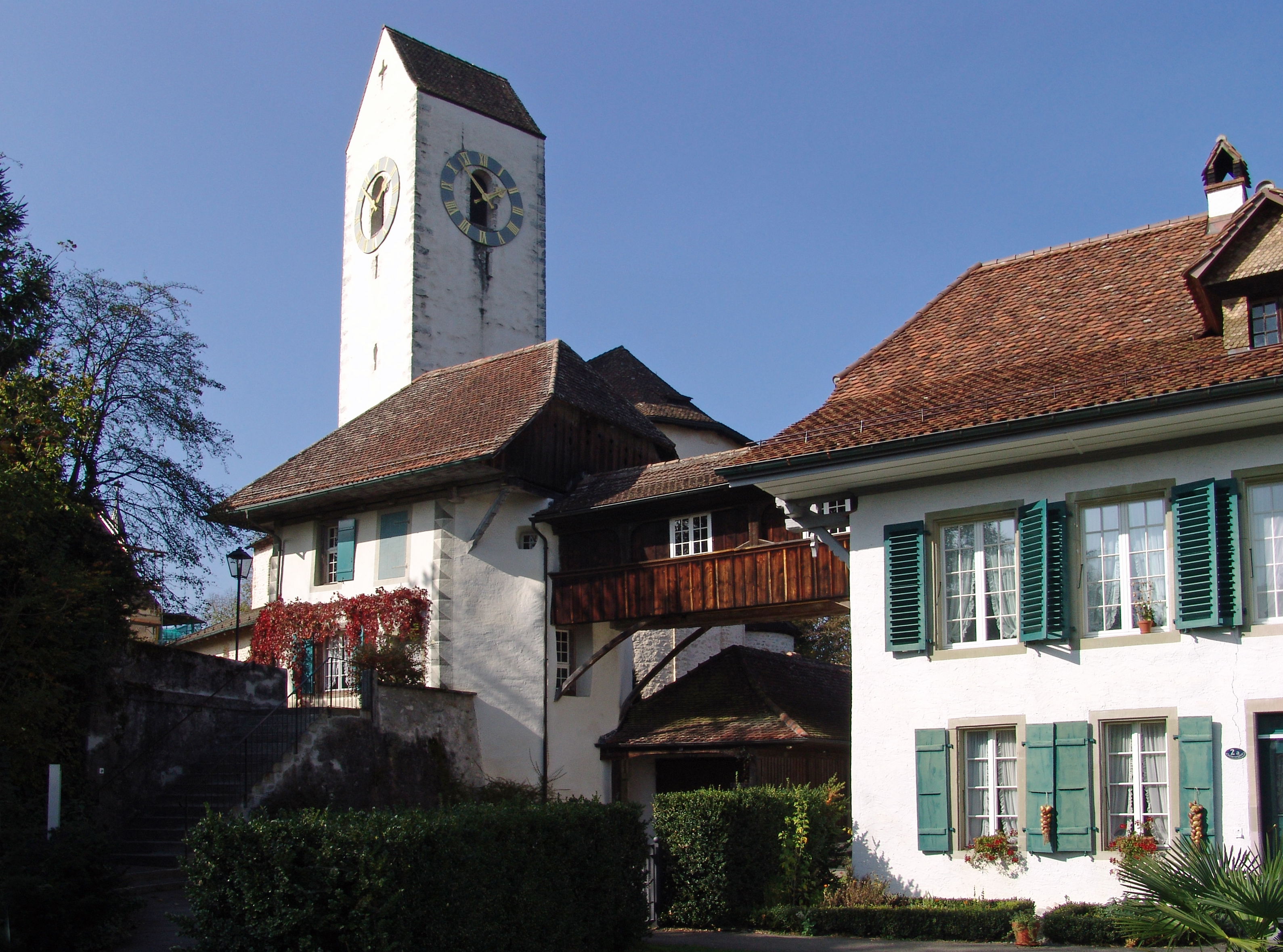 Pfarrhaus und Kirche Amsoldingen